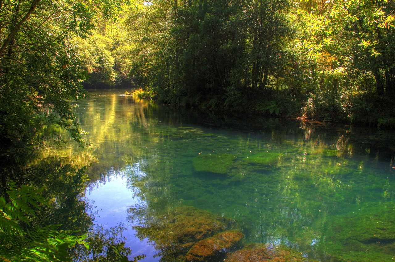 Fragas do Eume, Galicia, España.